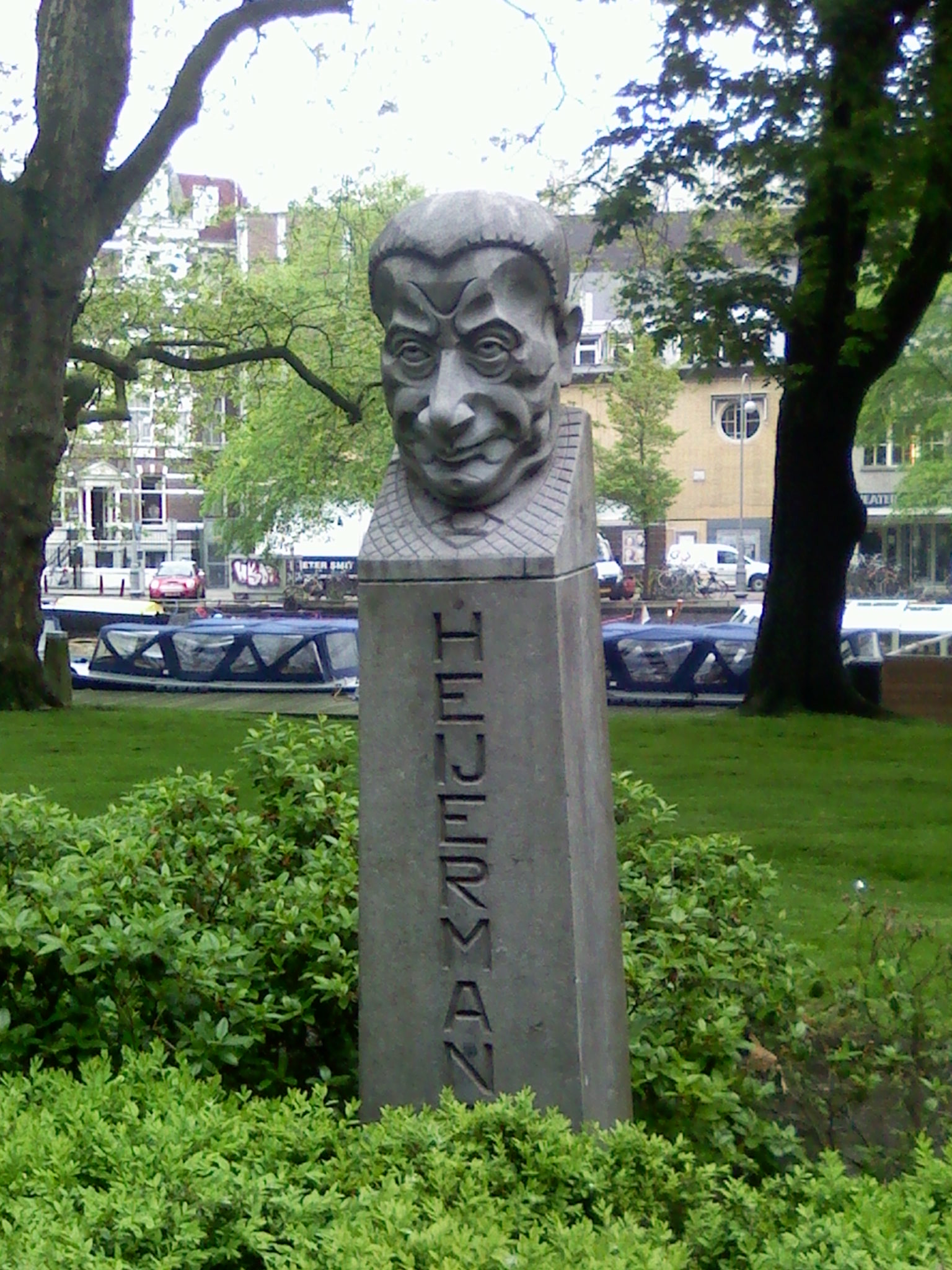 Herman Heyermans door Josef Mendes da Costa. Locatie in het Leidsebosje, Amsterdam-West